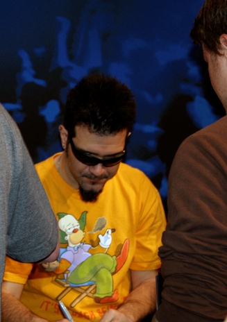 Charlie Benante signing autographs during NAMM 2009.